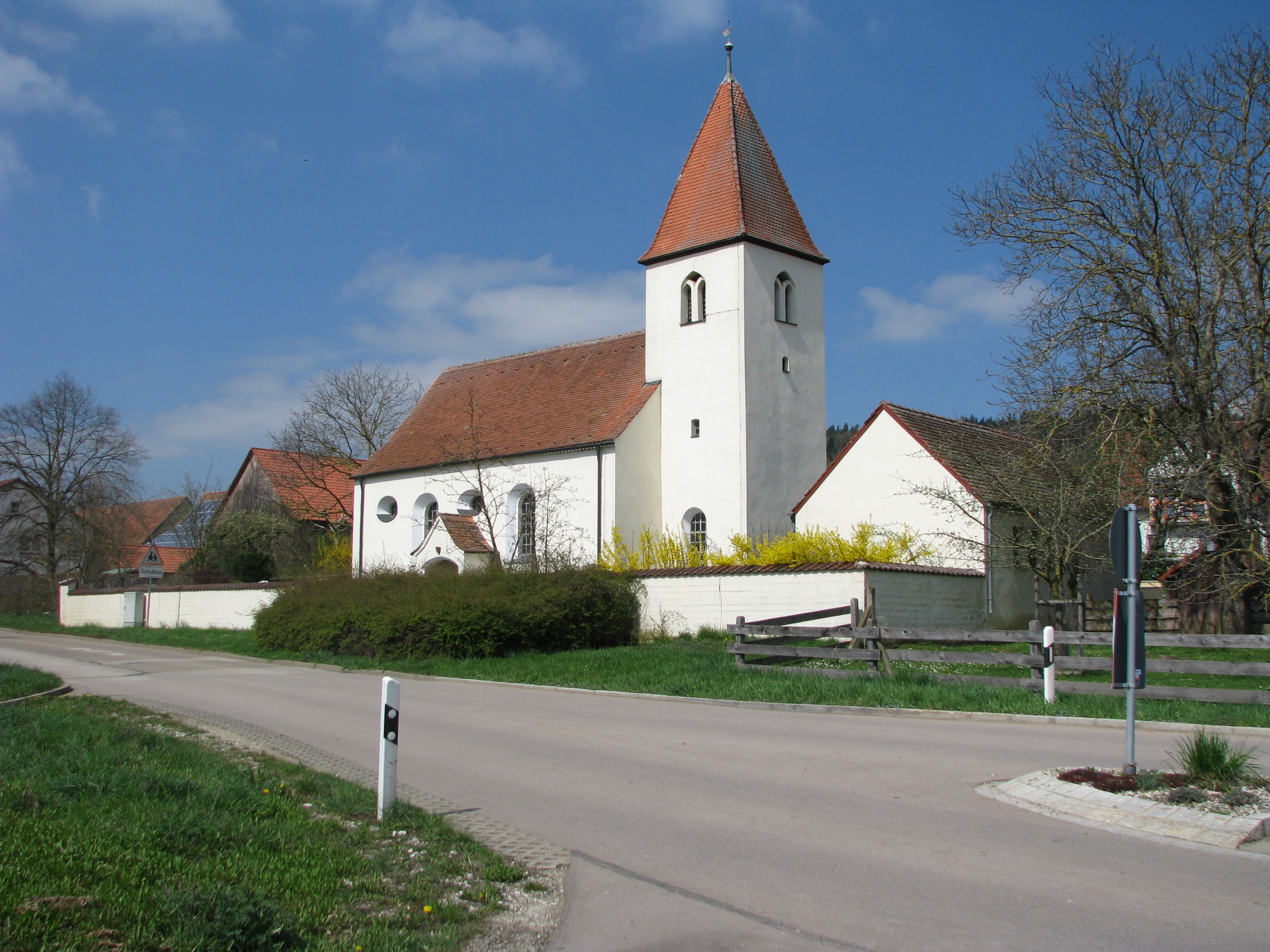 Kerkhofen, Ortsteil von Mühlhausen im Landkreis Neumarkt in der Oberpfalz, evangelische Pfarrkirche St. Othmar (18. Jahrhundert)